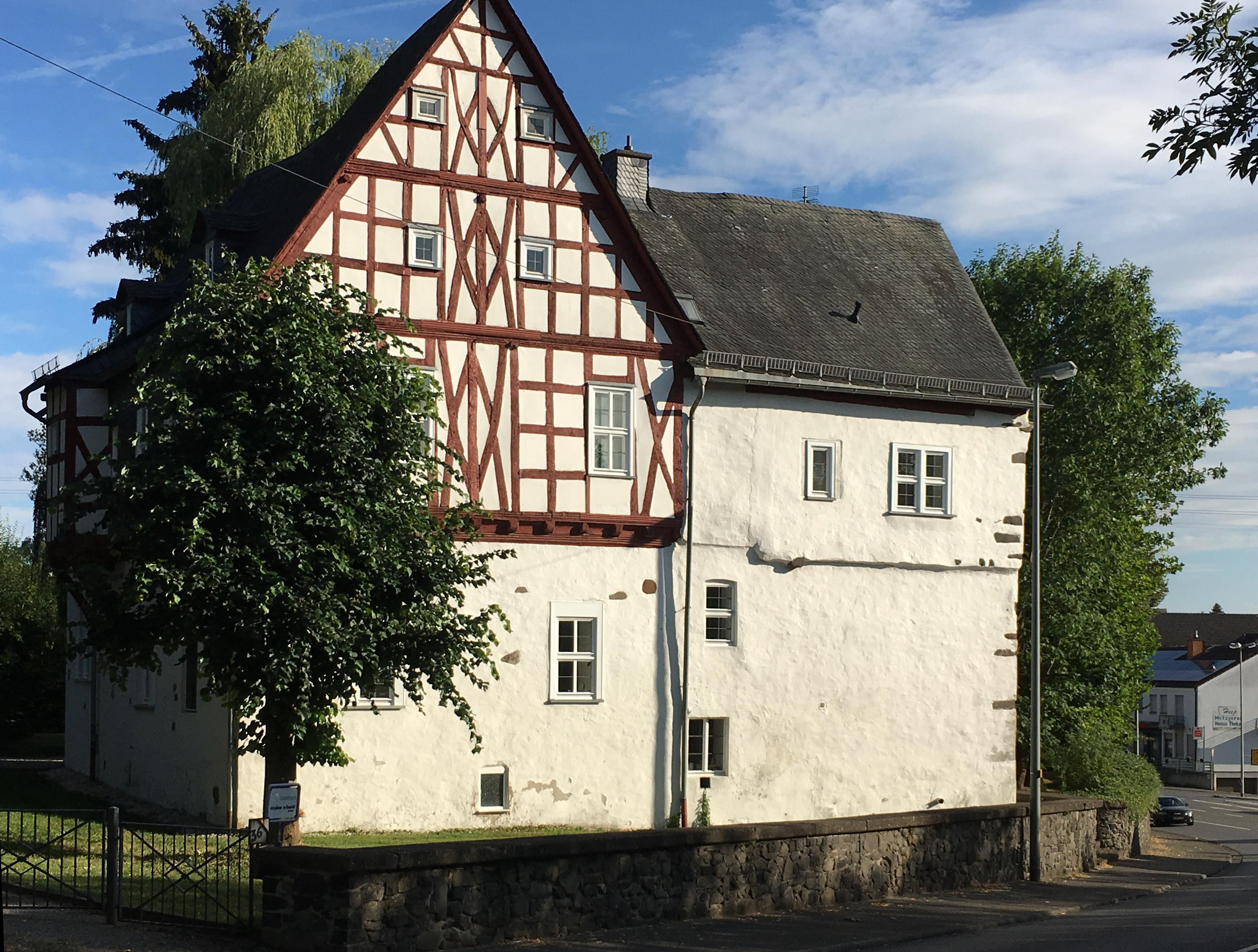 Hofhaus Langendernbach Nordseite 2018.